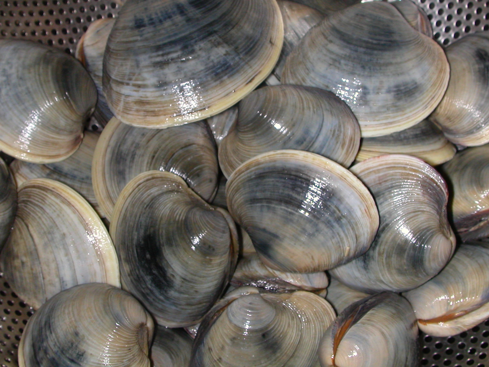 Mercenaria mercenaria(ホンビノス)